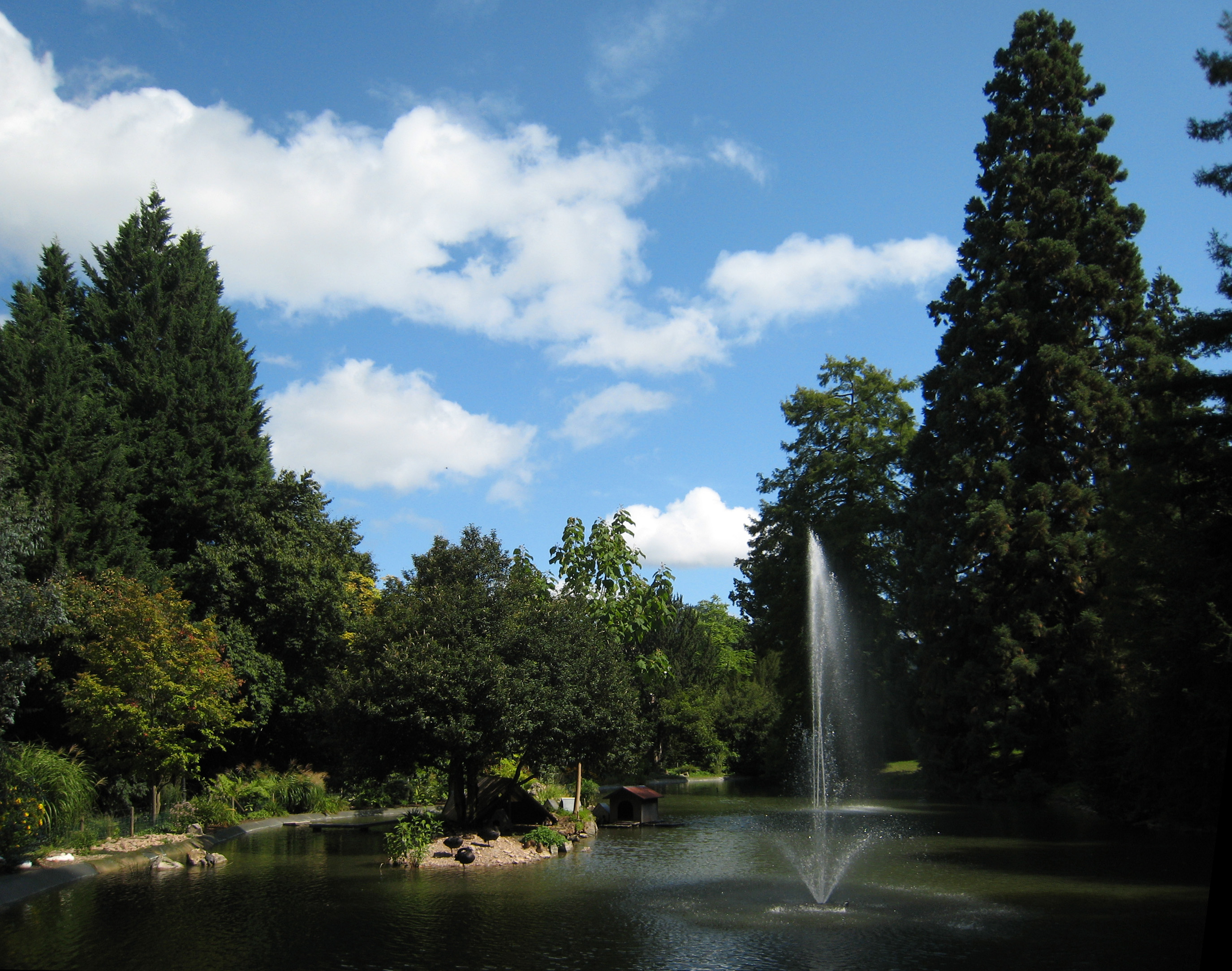 Schwanenweiher im Kurpark von Badenweiler. Badenweiler/Süd-Schwarzwald/Deutschland